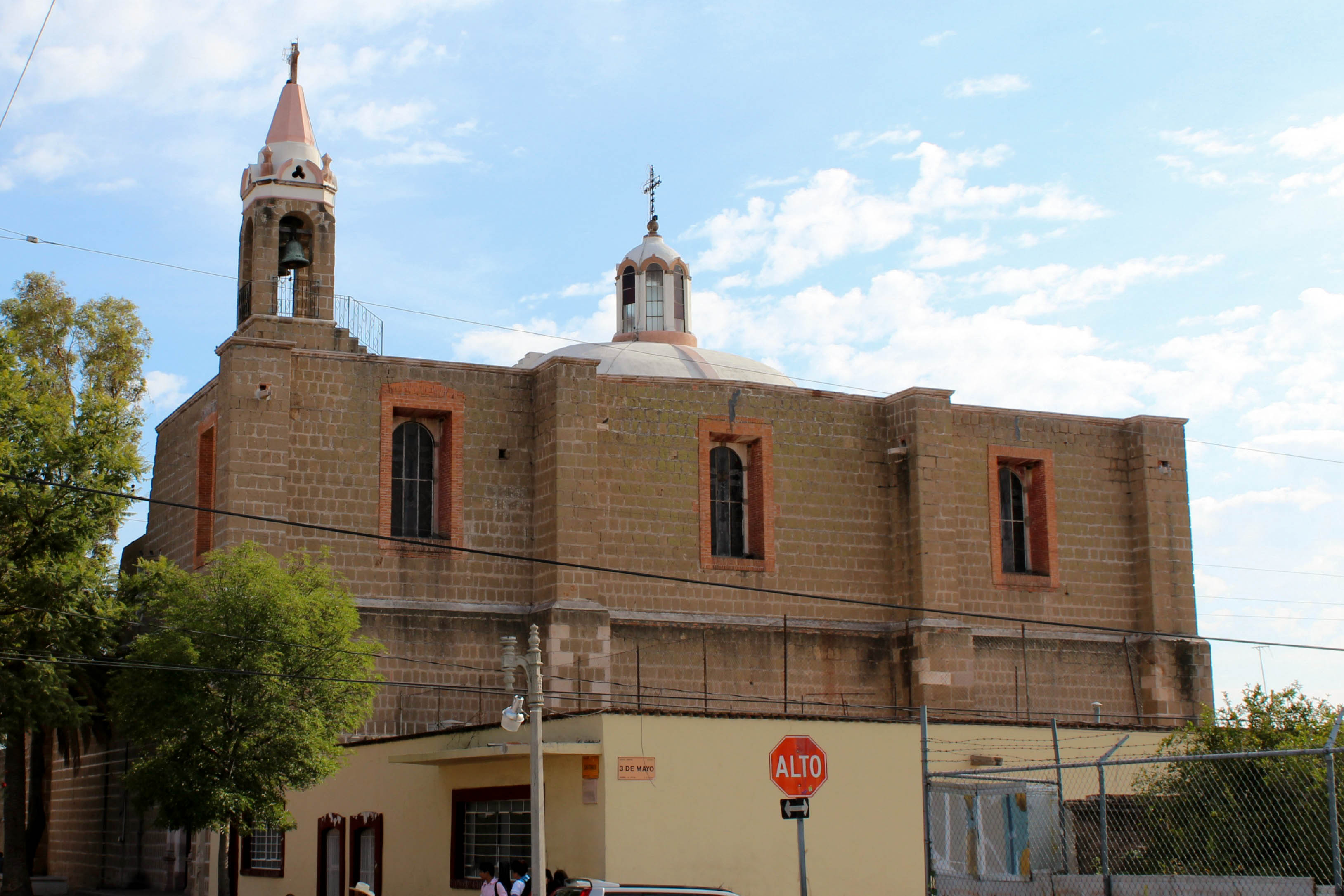 TEMPLO DE LA VIRGEN DE LA SALUD